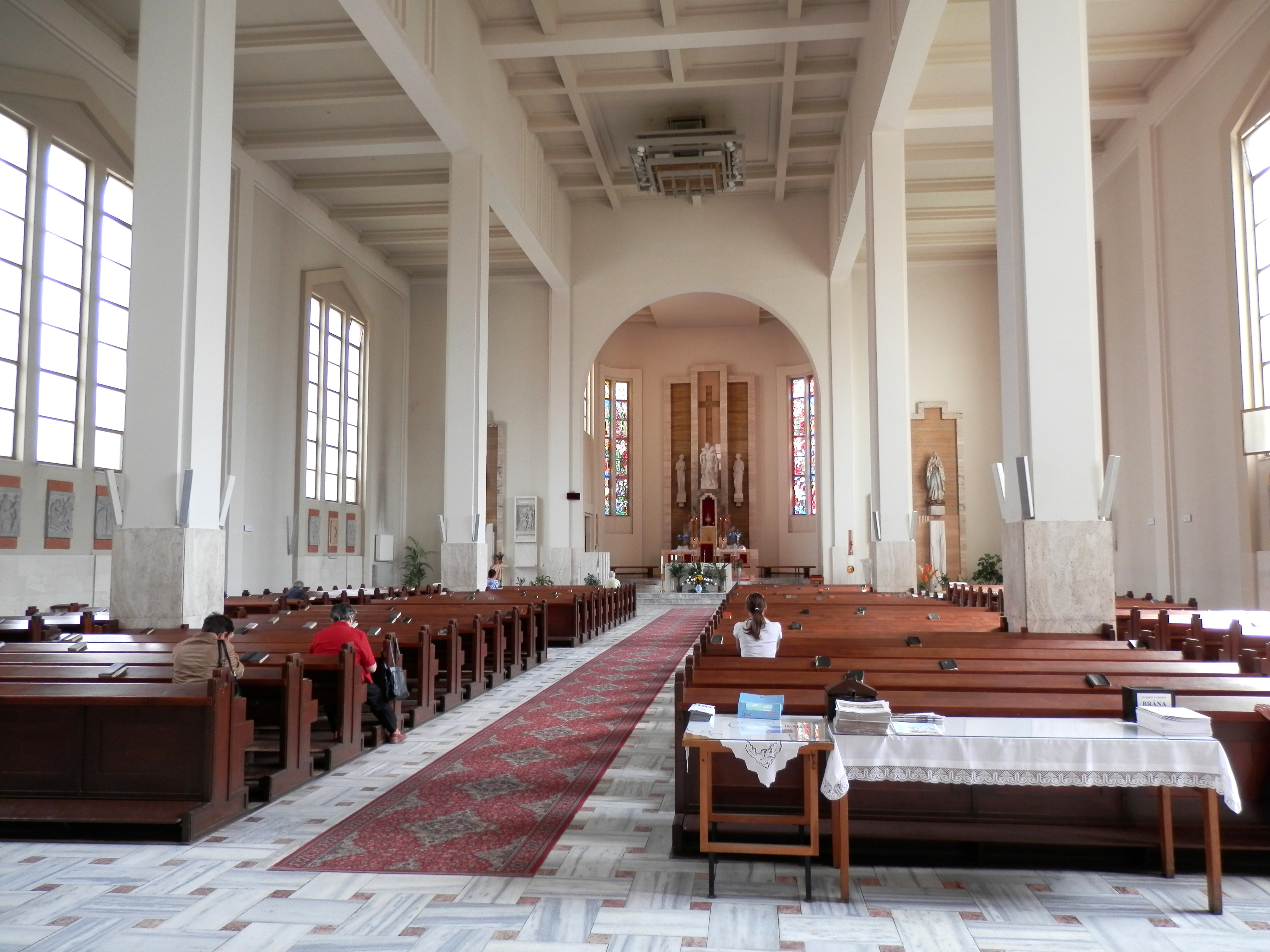 Konkatedrála Sedembolestnej Panny Márie v meste Poprad, región Spiš.Interiér